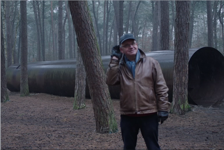 Toon, gids in het klankenbos, poseert bij het kunstwerk 'Oorsprong', een grote metalen fluit die midden in het bos ligt op het provinciaal domein Dommelhof in Neerpelt.